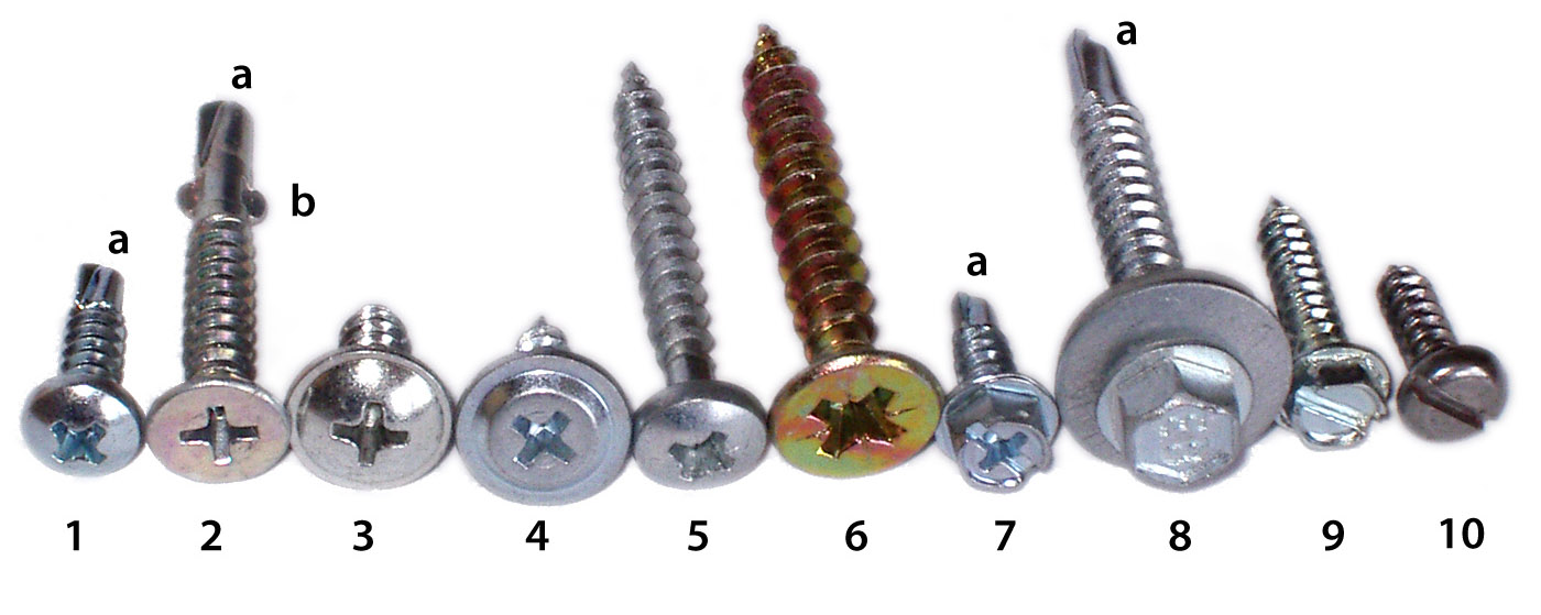 Przykłady wkrętów blachowkręt samowiertny, łeb z nacięciem PH, wkręt do materiałów warstwowych samowiertny (np. do przykręcania płyt plastykowych do metalu), łeb z nacięciem PH, wkręt montażowy, łeb z nacięciem PH, wkręt montażowy samowiertny, łeb z nacięciem PH, wkręt montażowy, łeb z nacięciem PZ, wkręt do drewna, łeb z nacięciem PZ, wkręt montażowy, łeb sześciokątny z nacięciem PH i prostym, wkręt do pokryć blacharskich, samowiertny, z uszczelką, łeb sześciokątny, wkręt montażowy, łeb sześciokątny z nacięciem prostym, blachowkręt nierdzewny, łeb z nacięciem prostym. a)końcówka samowiertna, b)skrzydełka rozwiercające miękki materiał.